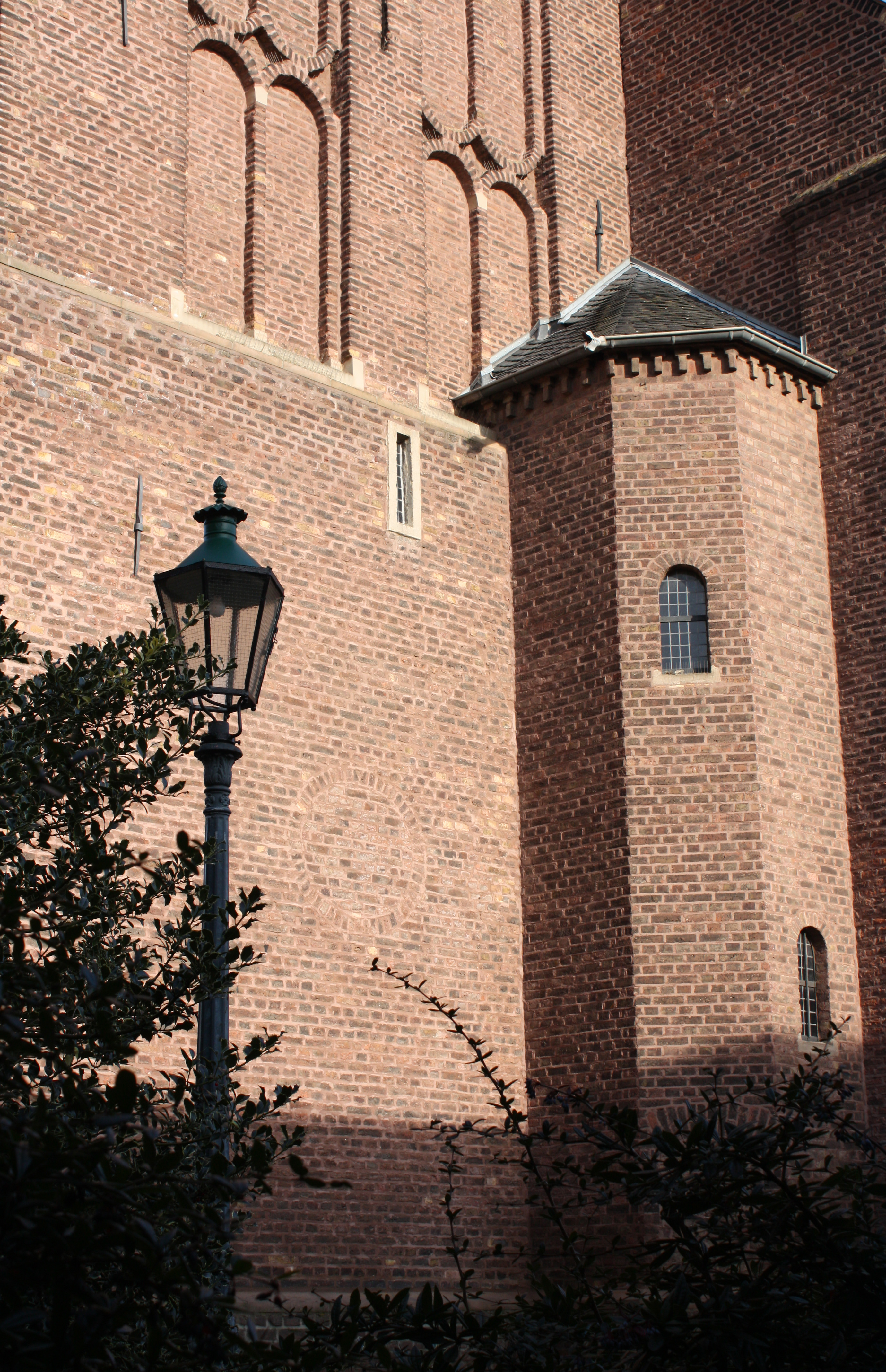 Erftstadt-Lechenich, St. Kilian. Blendwerk des Turmmauerwerkes